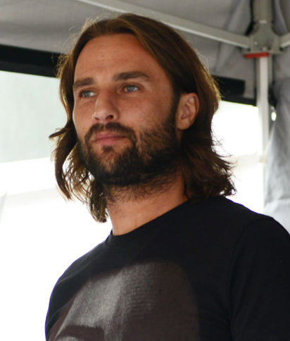 Marek Uram